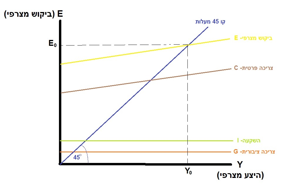 המודל הקיינסיאני